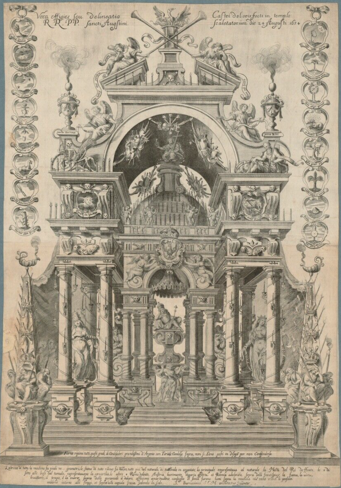 Castrum doloris für Ferdinand IV. in der Augustinerkirche am 24. August 1654 (Zeichnung von Giovanni Burnacini)